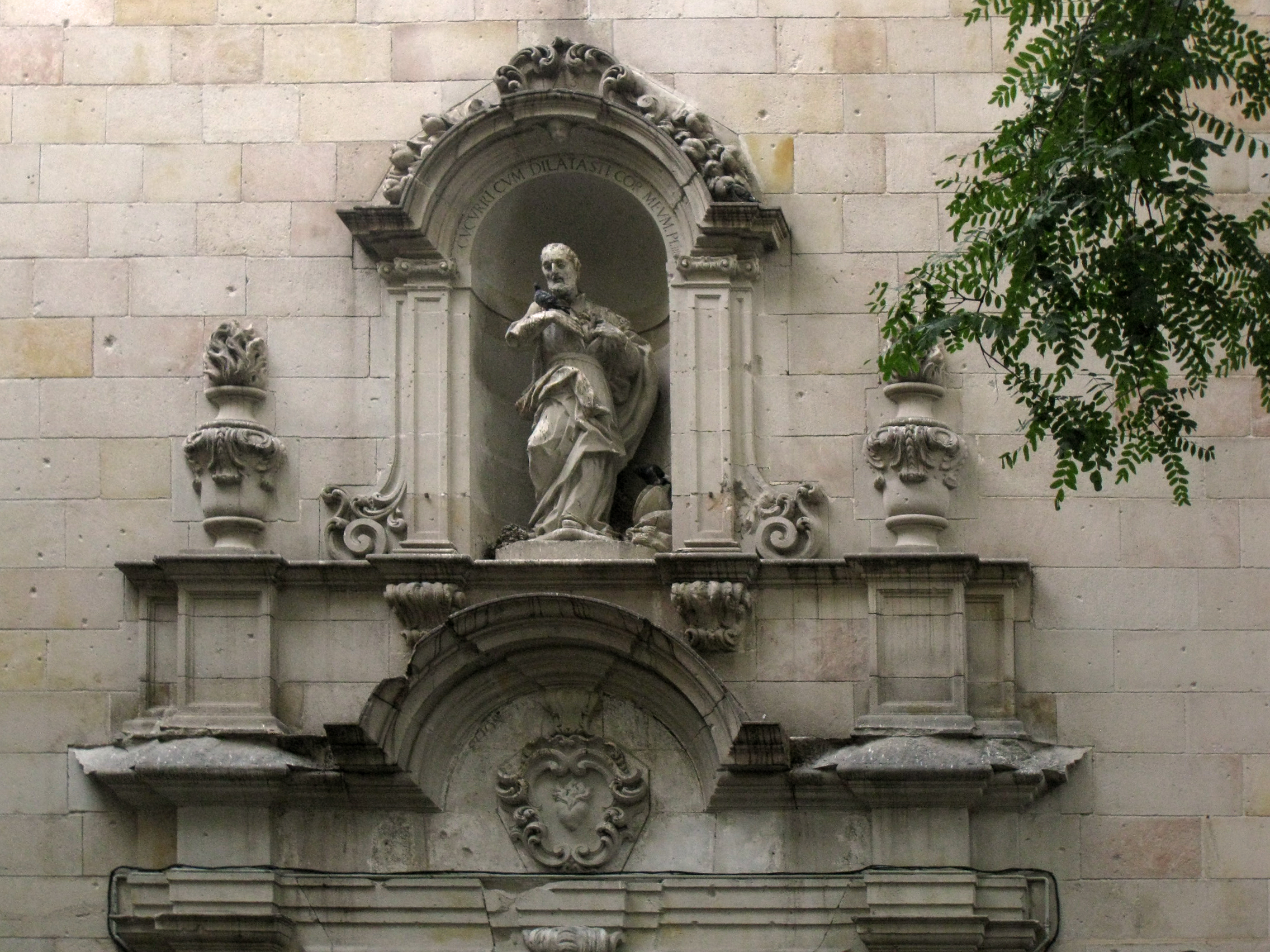 Església barroca de Sant Felip Neri, a la plaça homònima, al barri Gòtic de Barcelona. A la imatge, detall de la façana, amb la fornícula amb l'estàtua del sant titular.